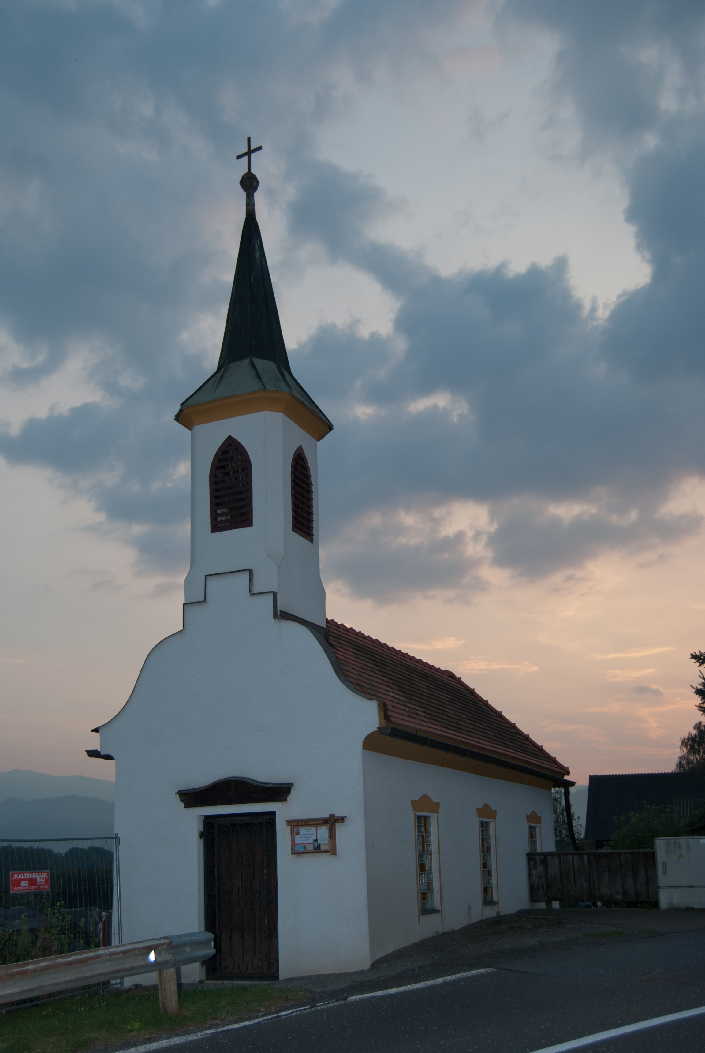 Ortskapelle